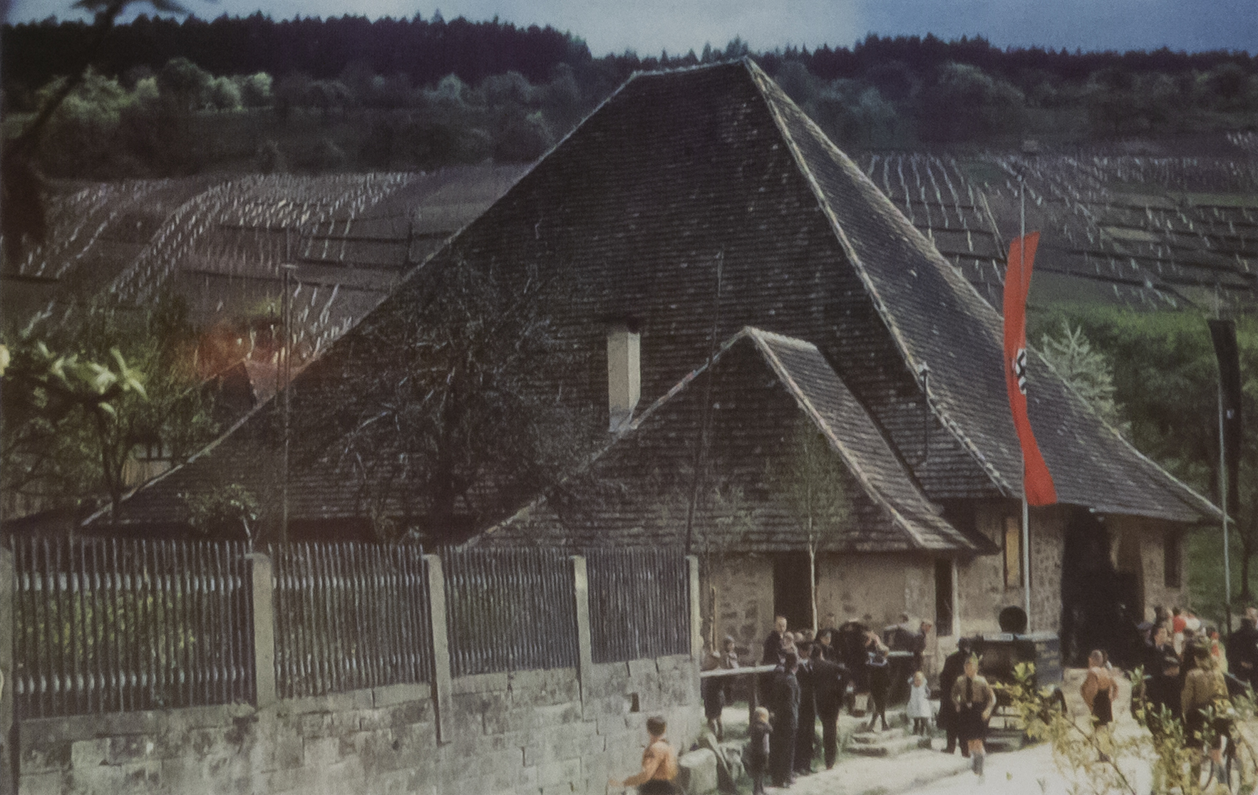 Die Glockenkelter im dritten Reich.